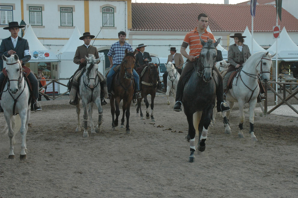 Cavalos na Feira da Golegã